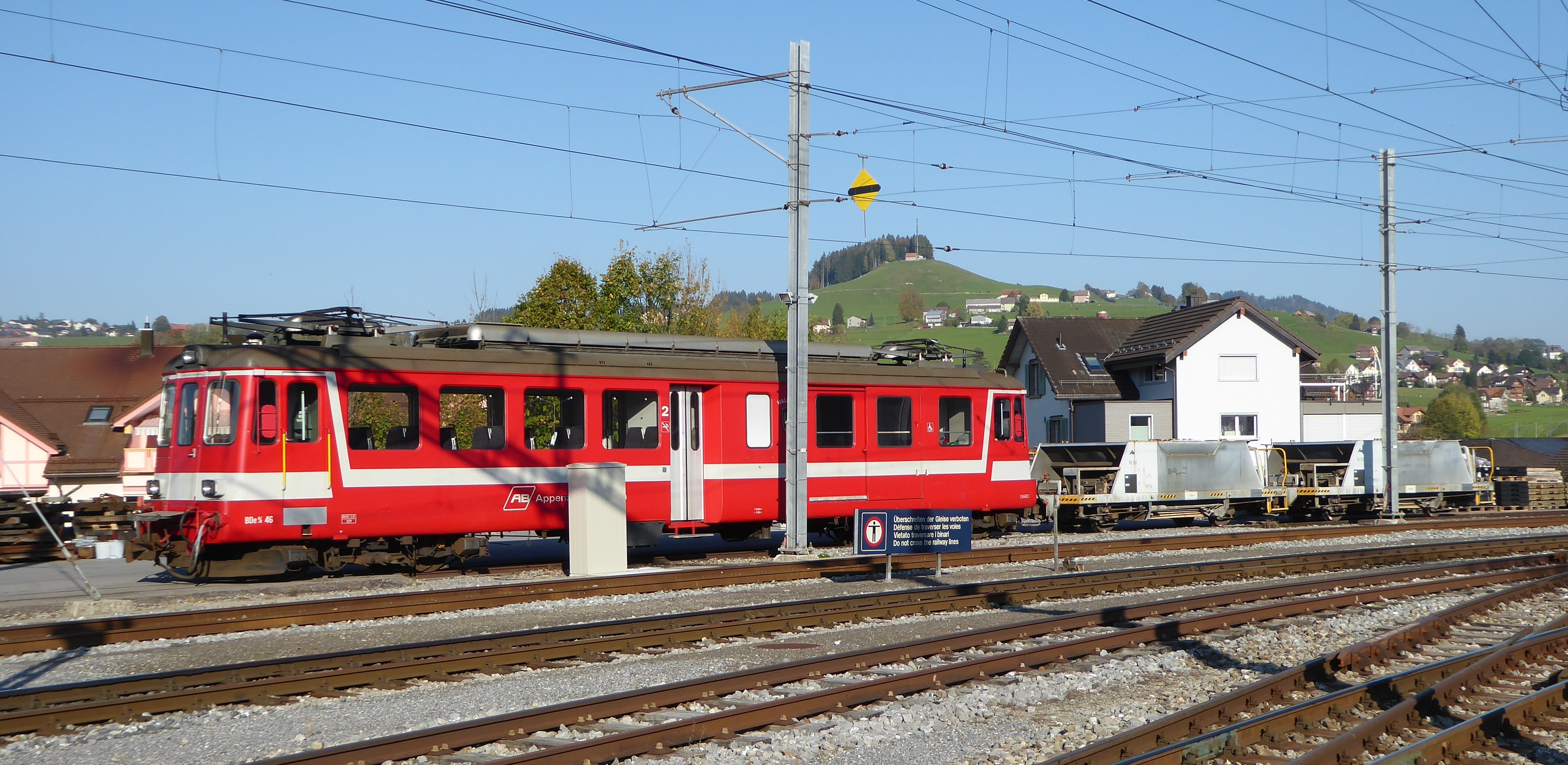 Triebwagen BDe 4/4 46 der Appenzeller Bahnen (AB) mit zwei Schotterwagen in Appenzell